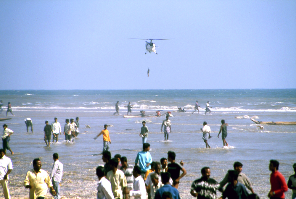 Marina Beach i Chennai efter den första vågen av tsunami, 26 december 2004. Fotograferad av Henryk Kotowski.